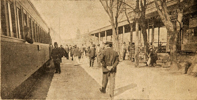 Vista del andén de la estación Quillota en 1904. Lectura original de la foto: "Estación de Quillota. Llegada de viajeros"